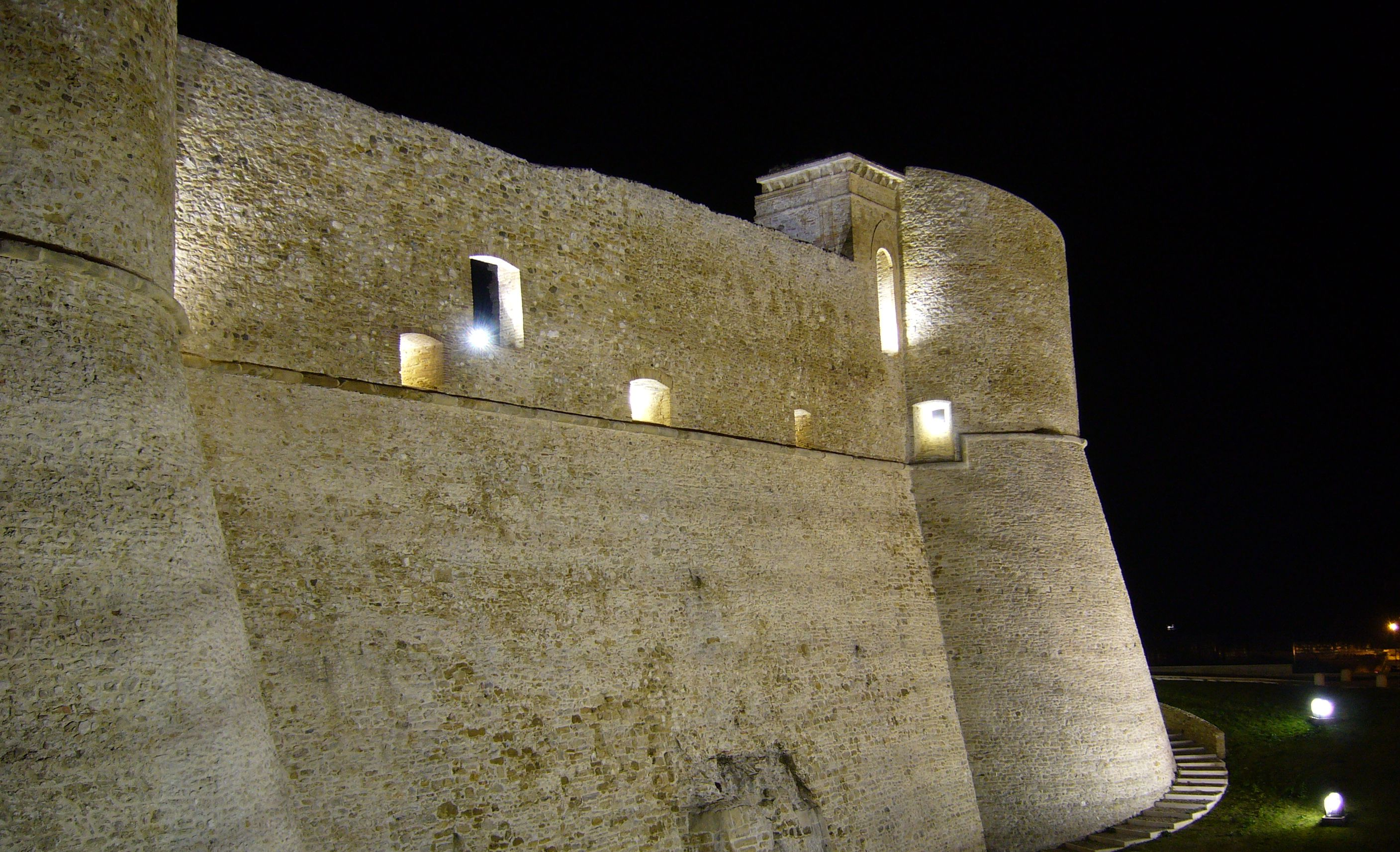 Ortona Castello Aragonese by Night